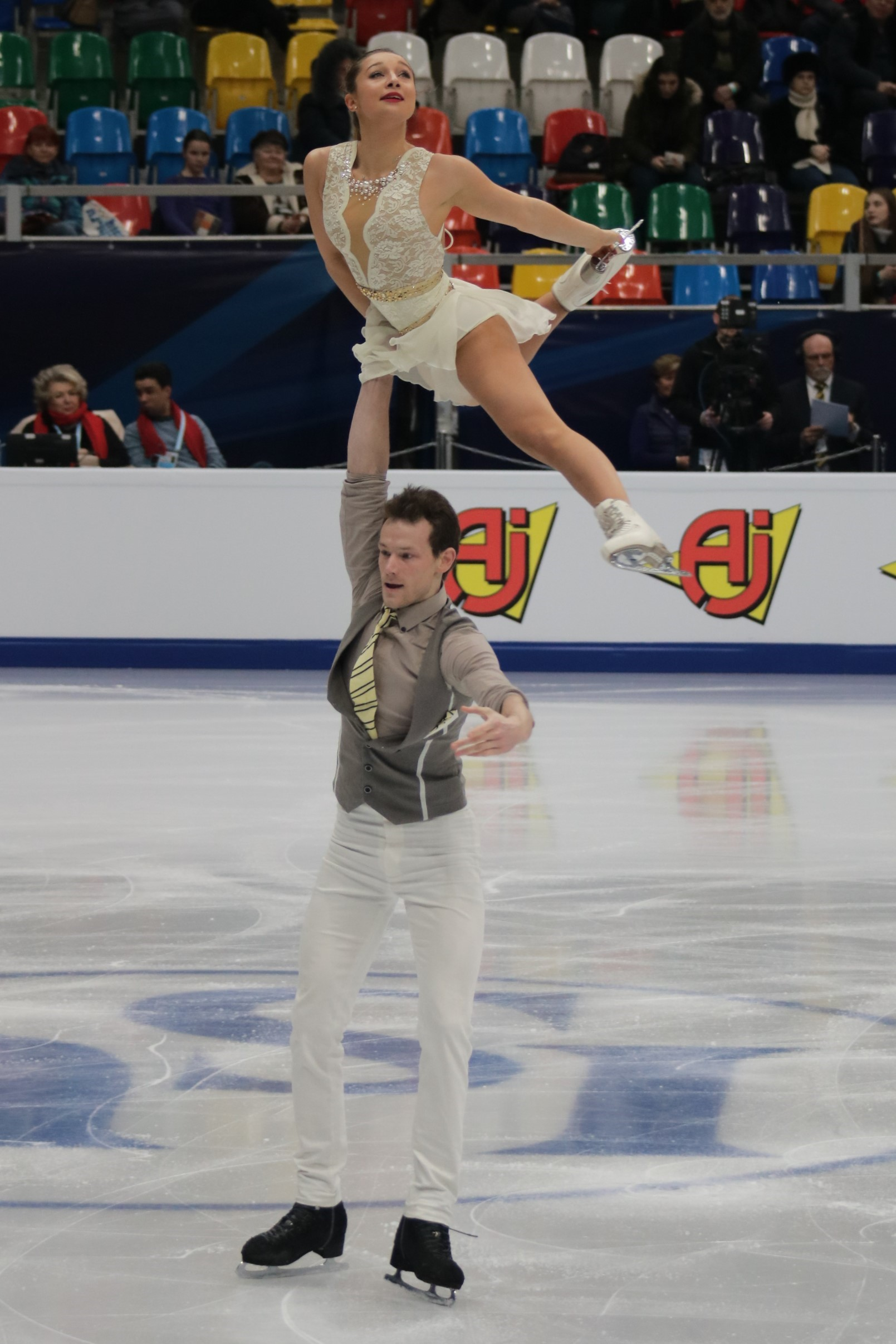 Лола Эсбрат / Андрей Новосёлов (Франция) на Чемпионате Европы по фигурному катанию 2018.